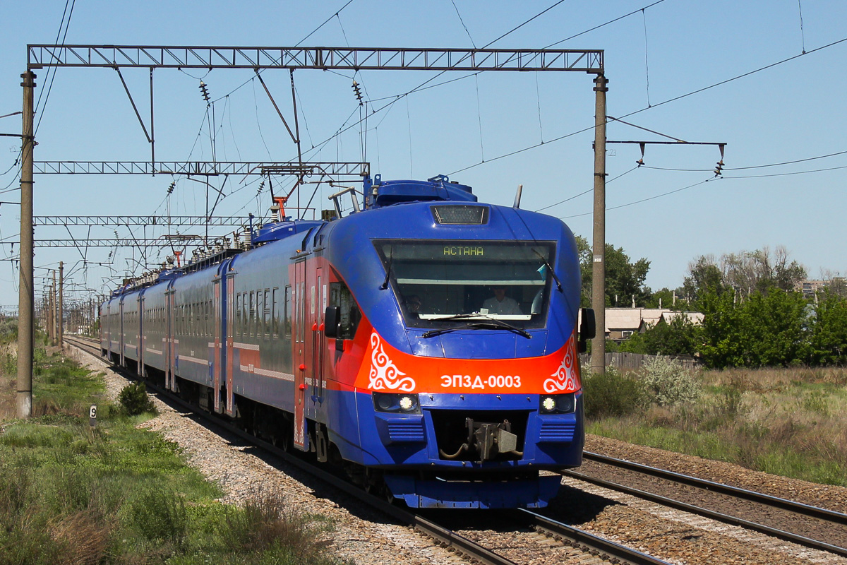 Электропоезд заказан «Қала маңындағы тасымал» АҚ Қазақстан темір жолы (АО "Пригородные перевозки" Казахстанских железных дорог) в шестивагонной составности. В составе имеет вагоны повышенной комфортности. Эксплуатируется на маршрутах поездов 8** нумерации сообщением Караганда-Пассажирская — Астана.